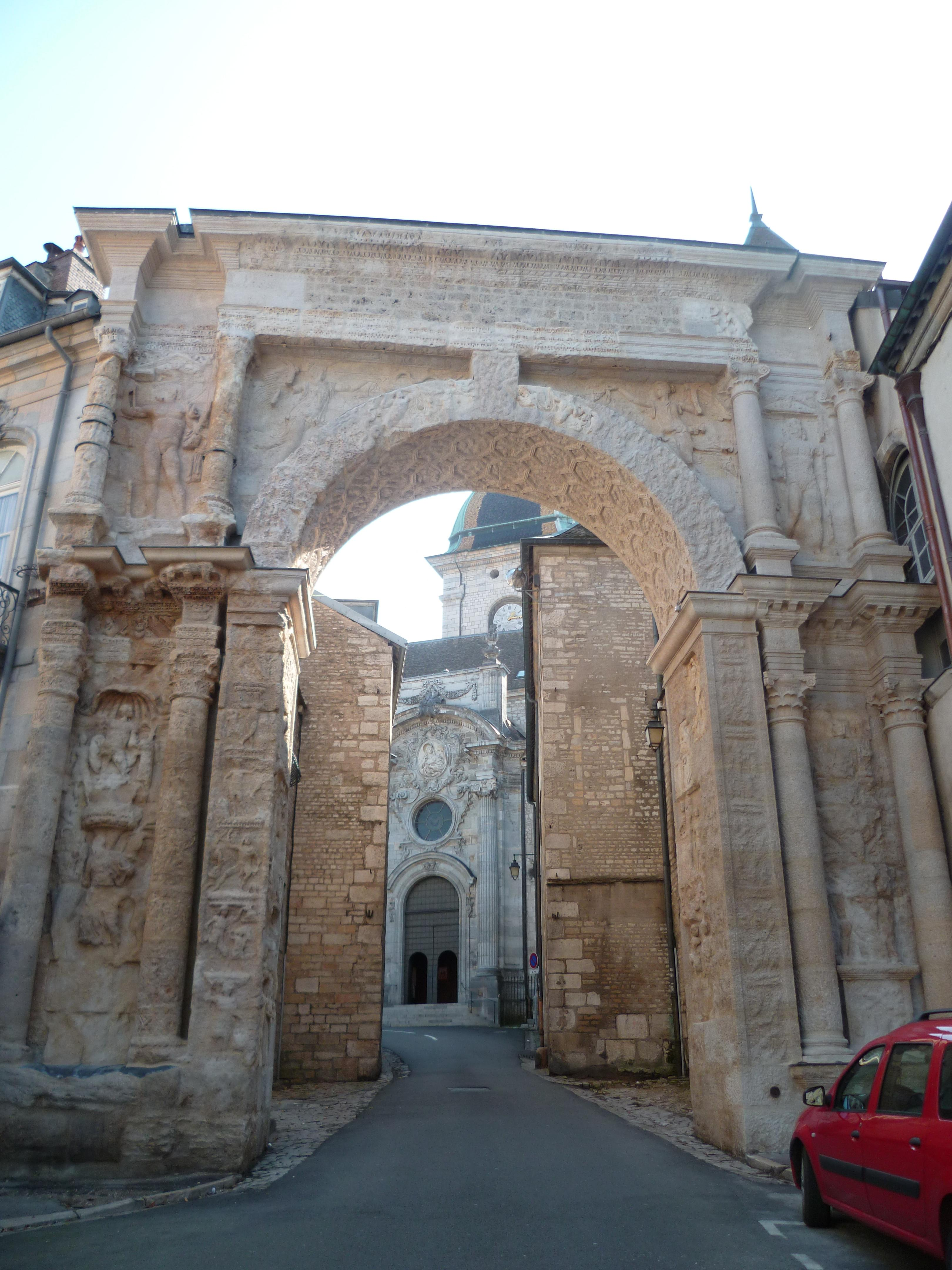 Arc de triomphe édifié sous l'empereur romain Marc Aurèle au iie siècle à Besançon